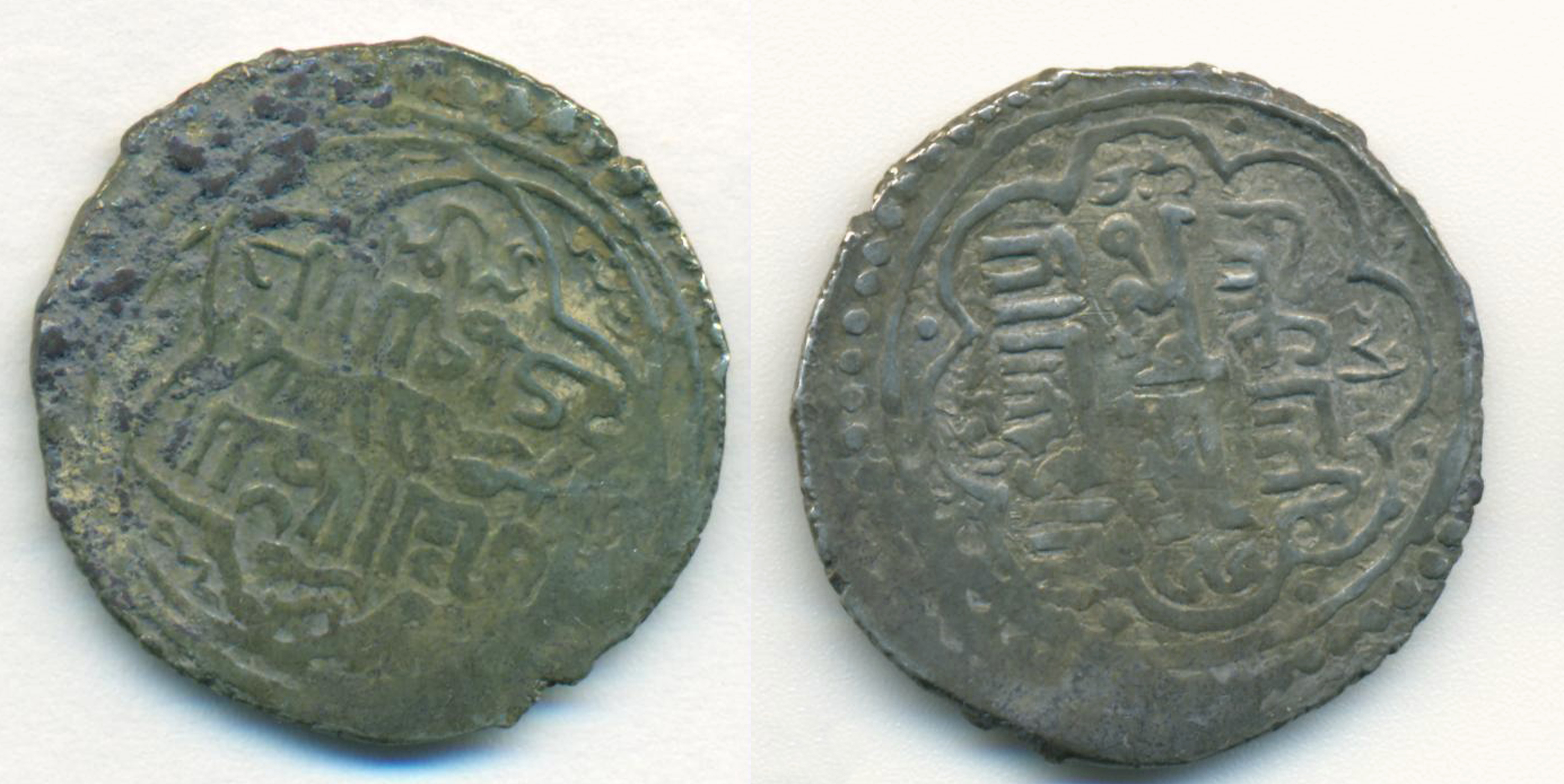 این سکه متعلق به طغاتیمور از بازماندگان ایلخانی است که در اسفراین ضرب گردیده است: باز خوانی سکه : احمد نیک گفتار